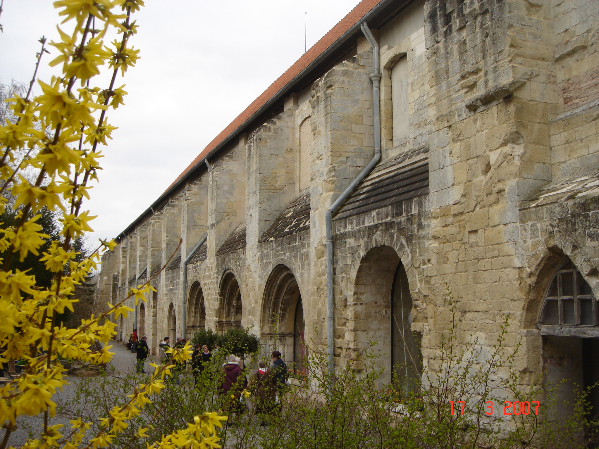 Abbaye de vaucelles ext 001